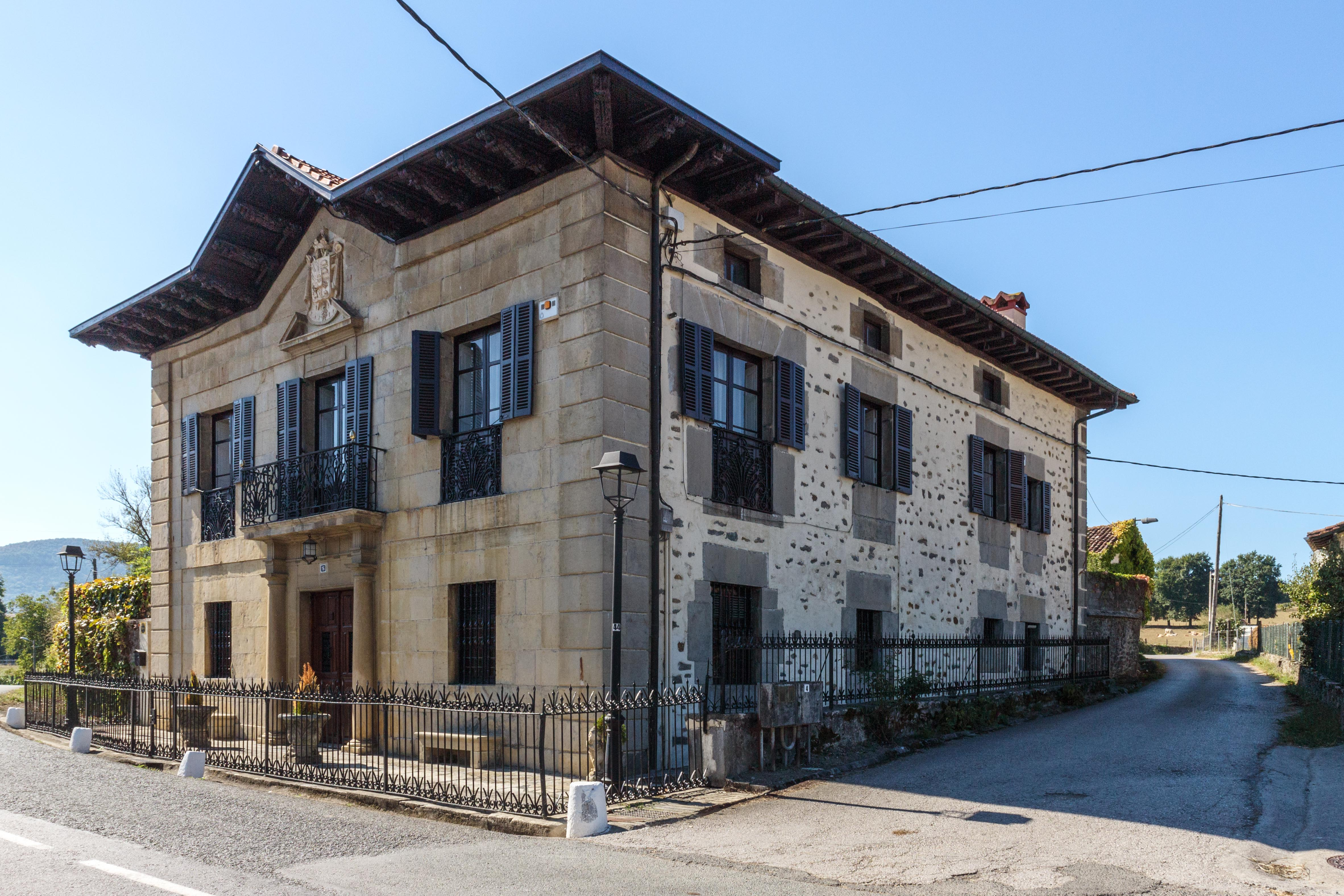 Urkijo jauregia